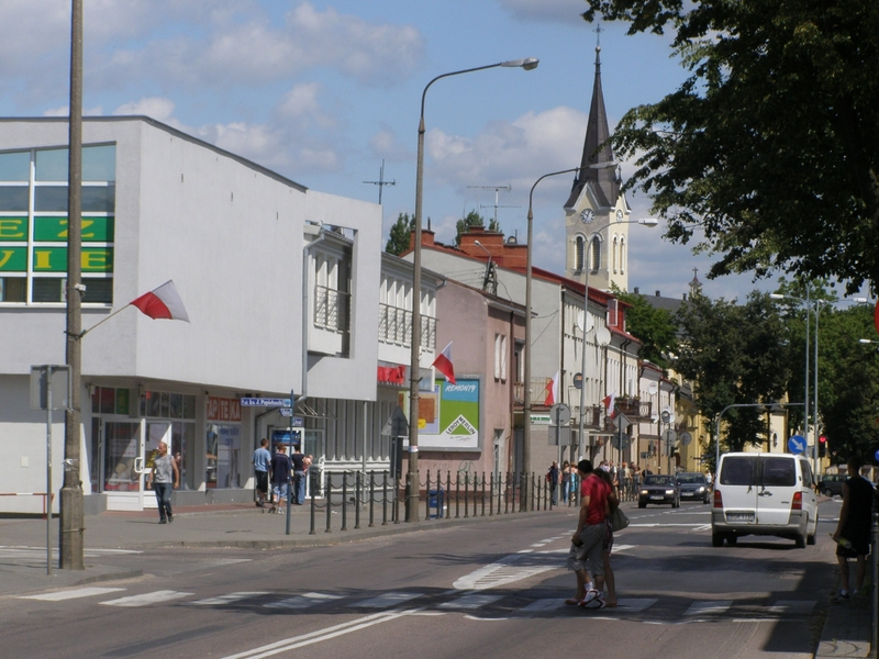 Grajewo - ulica Marszałka Józefa Piłsudskiego